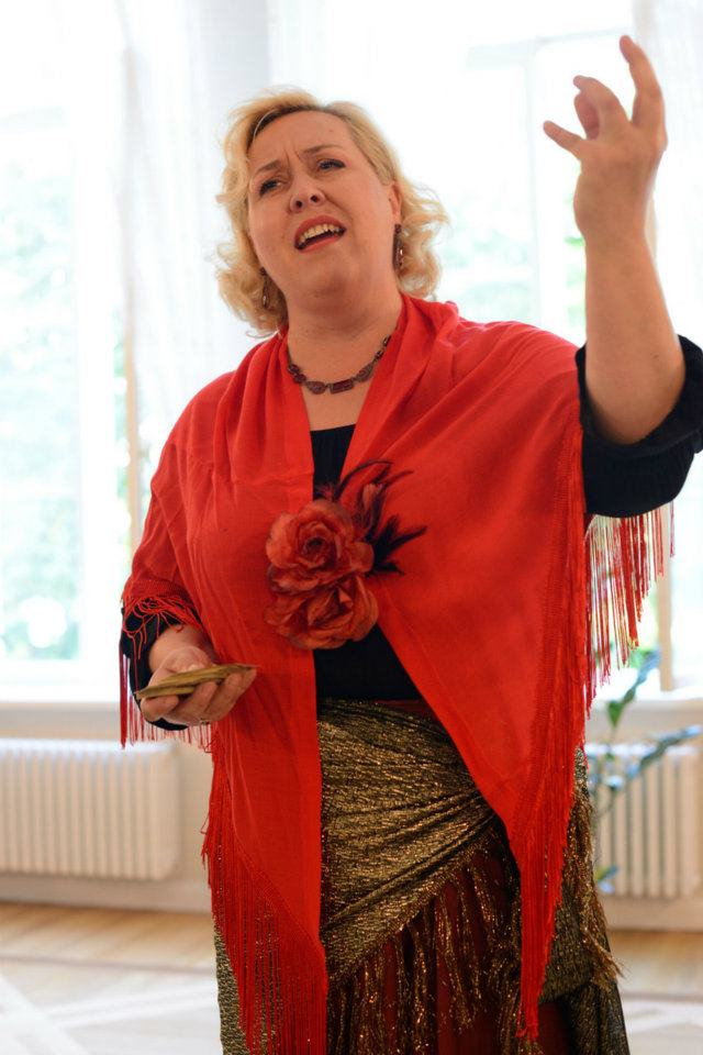 Triin Ella kontsert-etendusel Muusika läbi pisarate Saka mõisas 13. juulil 2012